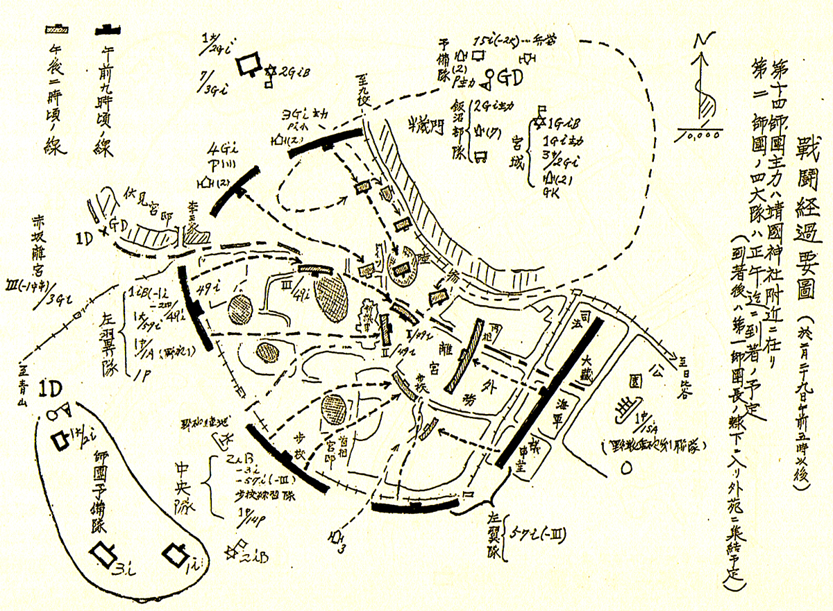 2月29日の戦闘経過要図。永田町一帯を占拠する叛乱軍を包囲した上で、ラジオとビラによる降伏勧告によって下士官兵を帰順させた。増援に来た歩兵第49聯隊（甲府）や歩兵第59聯隊（宇都宮）の一部も攻囲に加わっている。九段方面からは近衛歩兵第3・第4聯隊が。 The battle map as of AM9:00-14:00, February 29 1936. With the reinforcement of the IJA 15th, 49th, 59th Infantry Regiments, the attack was about to begin at AM9:00. The rebel force lost the command of its soldiers and surrendered by the evening of Februay 29; hence the end of the coup attempt.